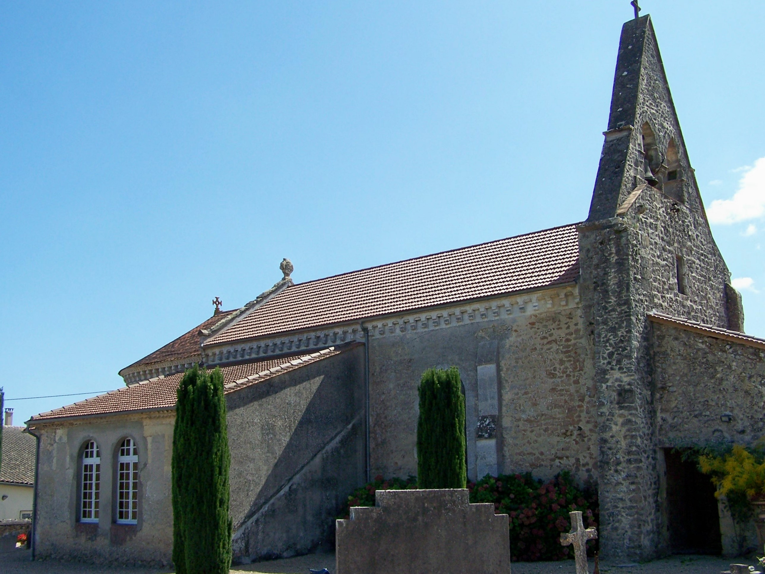 Église de Castillon-de-Castets, Gironde, France